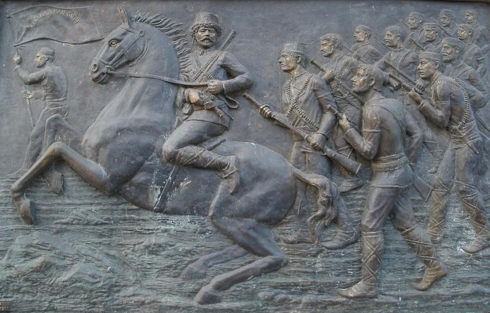 Питу_Гули_со_четата,_дел_од_споменикот_Лавови_на_мостот_Гоце_Делчев_во_Скопје